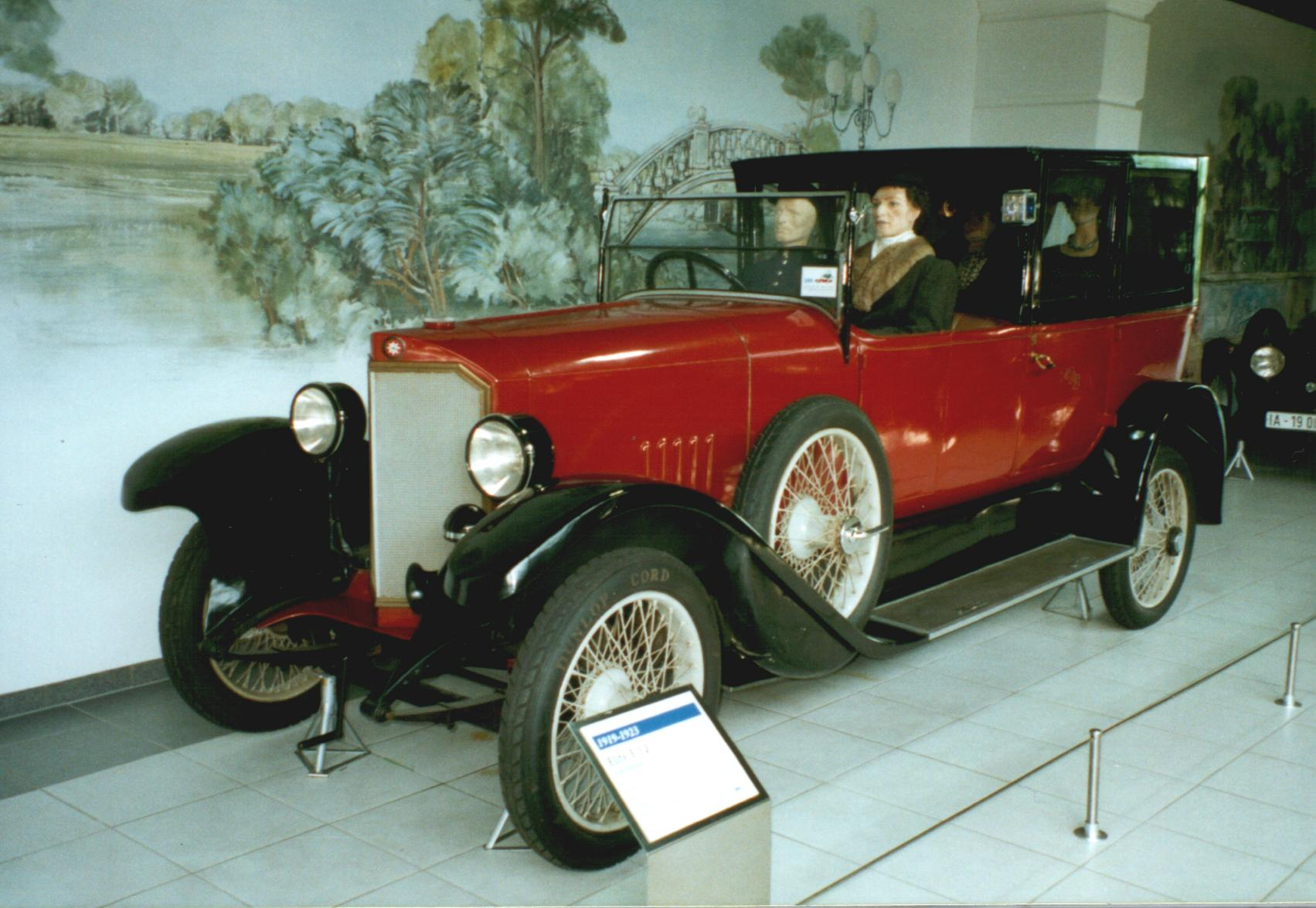 Elite E 12 12/40 PS Landaulet von 1919-1923